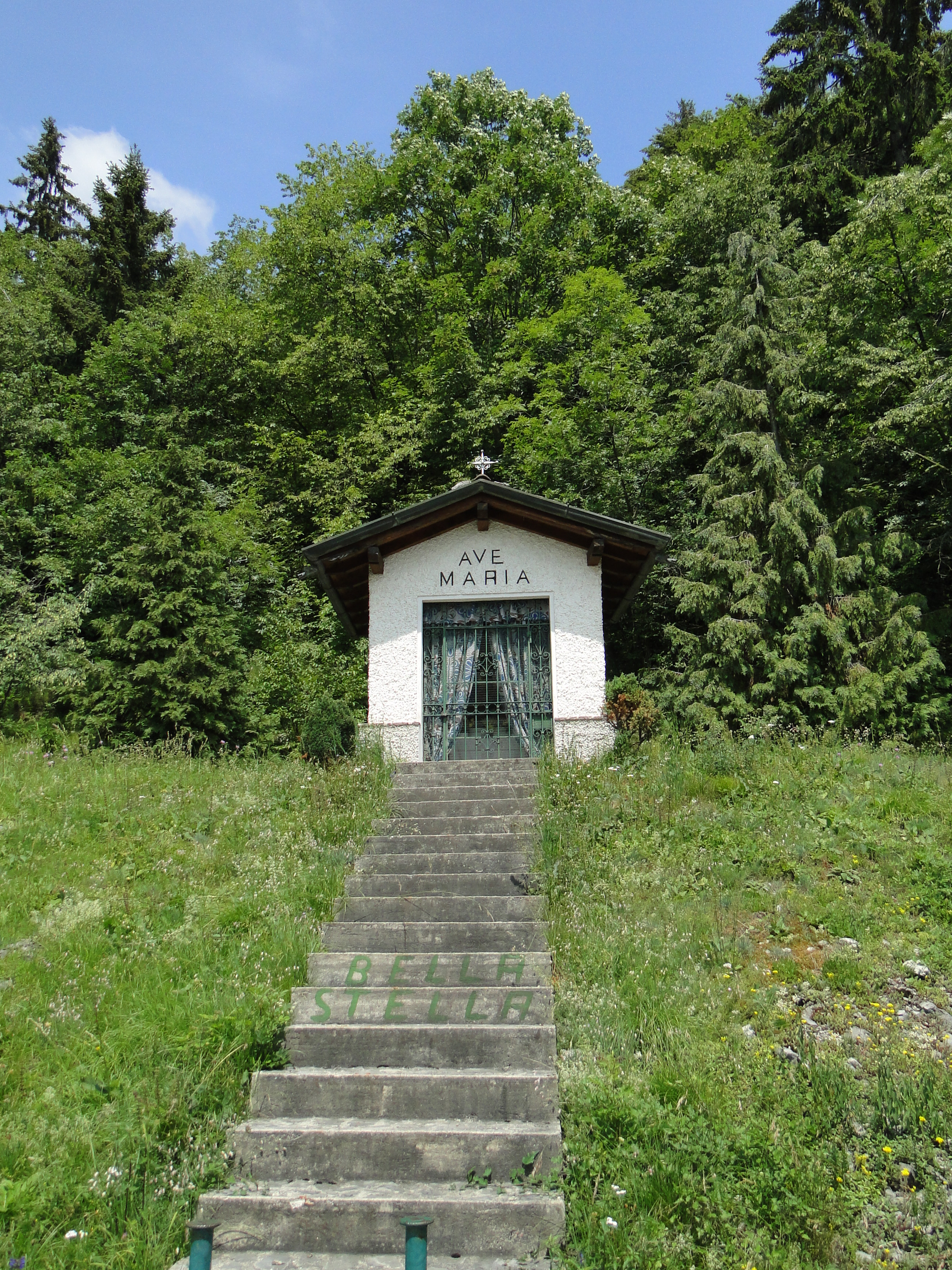 Aviatico (BG), cappelletta Forca